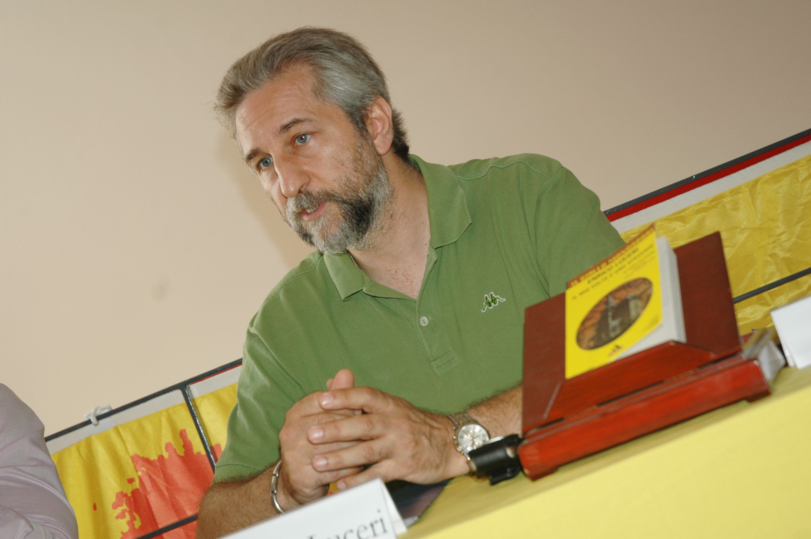 Sono io